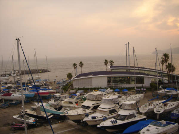 Zushi Marina, Japan